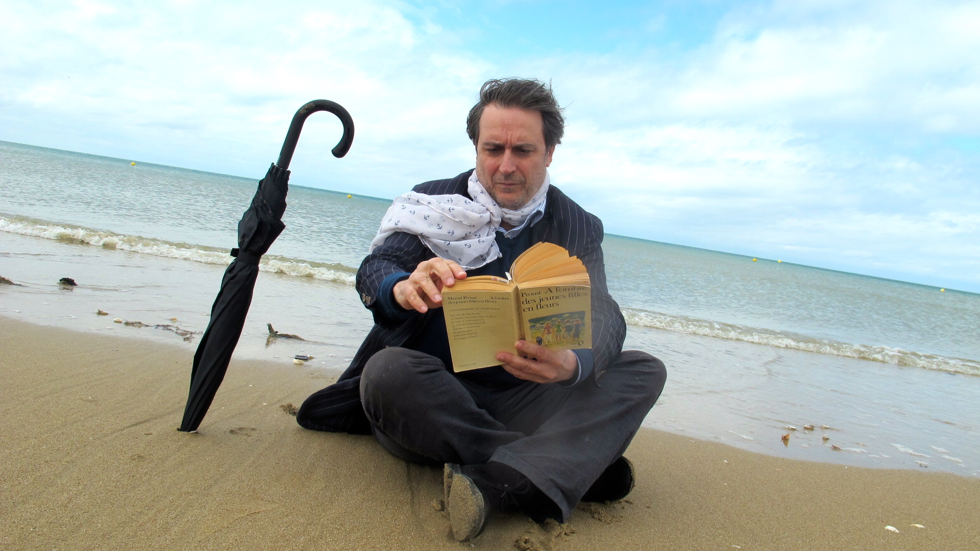 Marc-Edouard Nabe à Cabourg, 2015